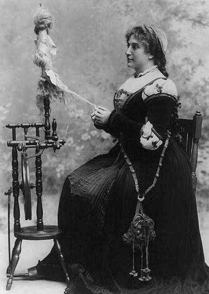 Australian opera singer Nellie Melba (1861-1931)